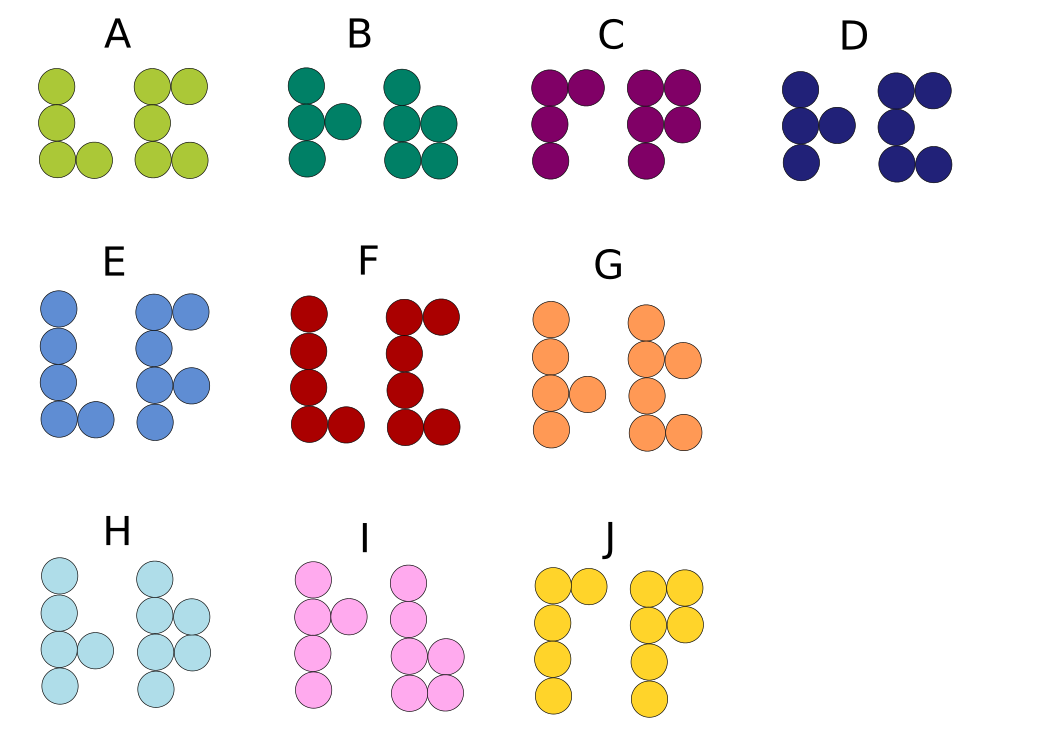 A schematic drawing of all pieces of the puzzle game IQFit.